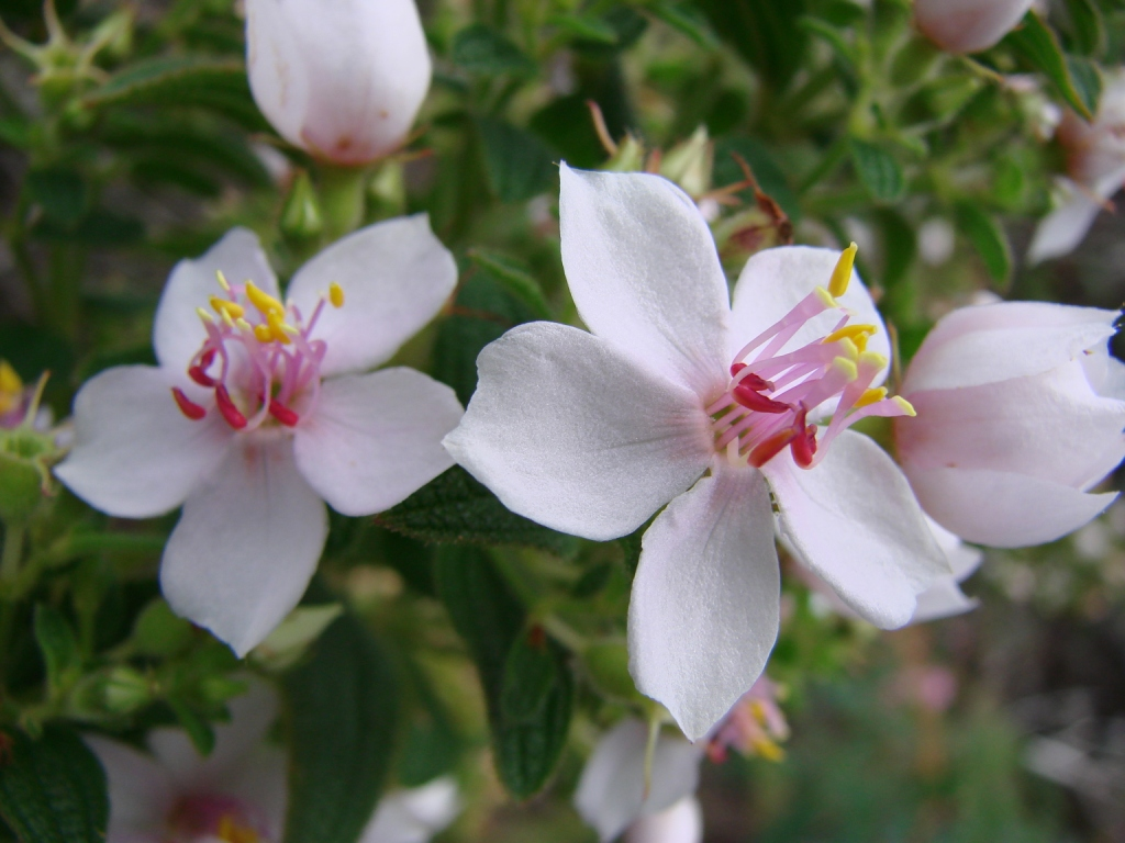 Trembleya neopyrenaica Naudin - MELASTOMATACEAE - Espécie endêmica de Goiás - Parque Estadual da Serra dos Pirineus - Pirenópolis - Goiás - Brasil.